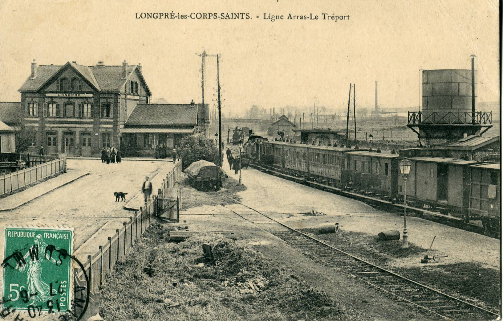 Carte postale ancienneLongpré-les-Corps-Saints, Somme, : Ligne Arras - Le Tréport